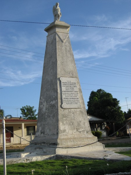 Homenaje a luchadores meleneros